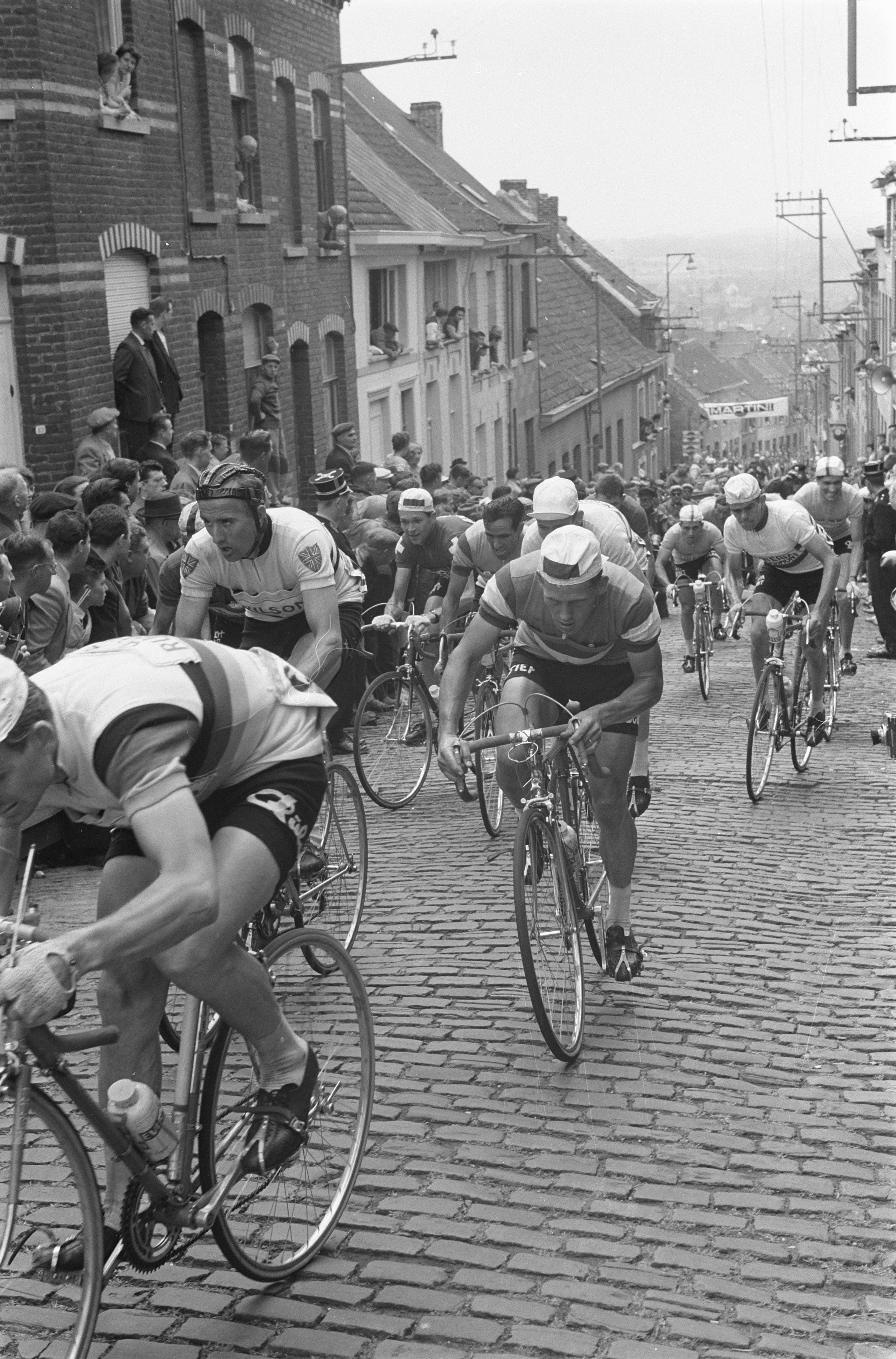 Beklimming Grammont (Geraardsbergen).